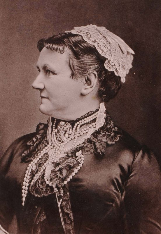 Portrait Carola von Sachsen. 1887. Albuminabzüge (?). Vollflächig auf Karton klebemontiert, typografisch bezeichnet "Paul Belkner, Berlin. 1887"